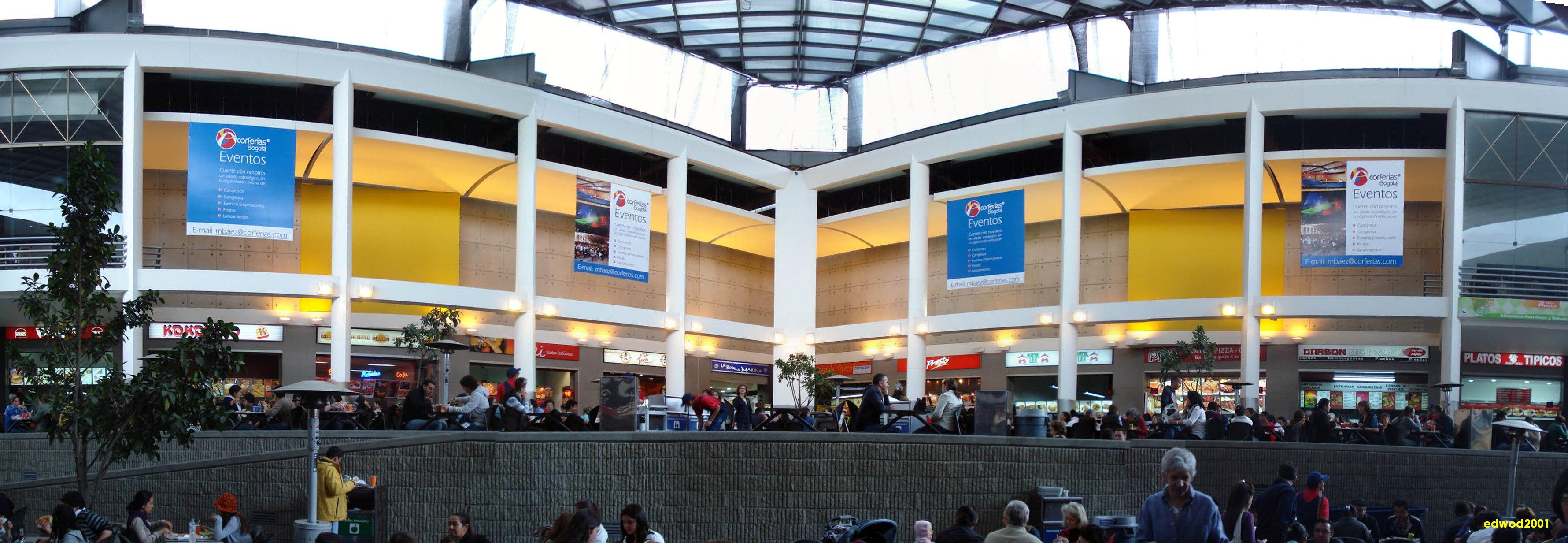 Corferias - Bogota - Colombia